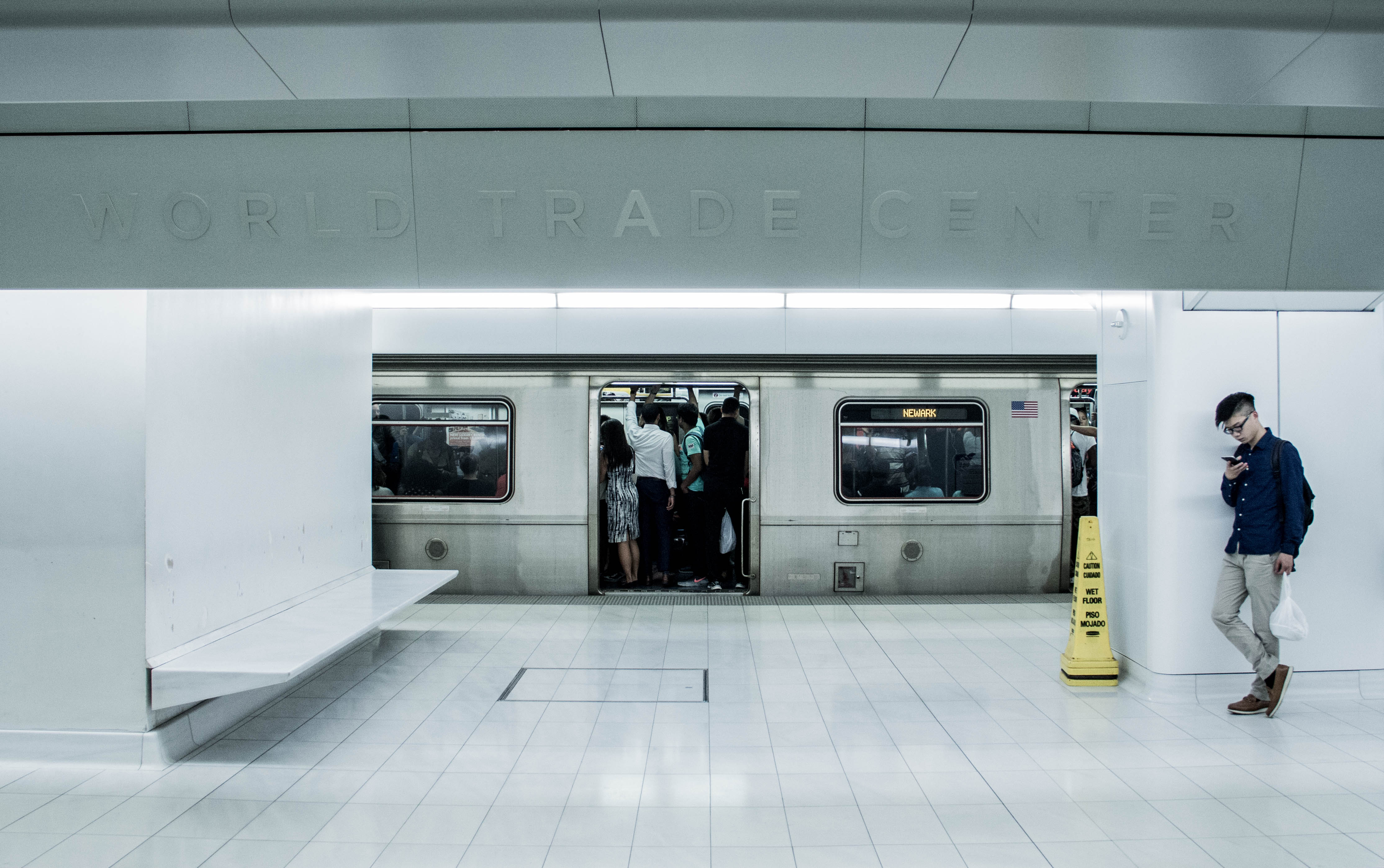 Banchina della stazione World Trade Center della PATH